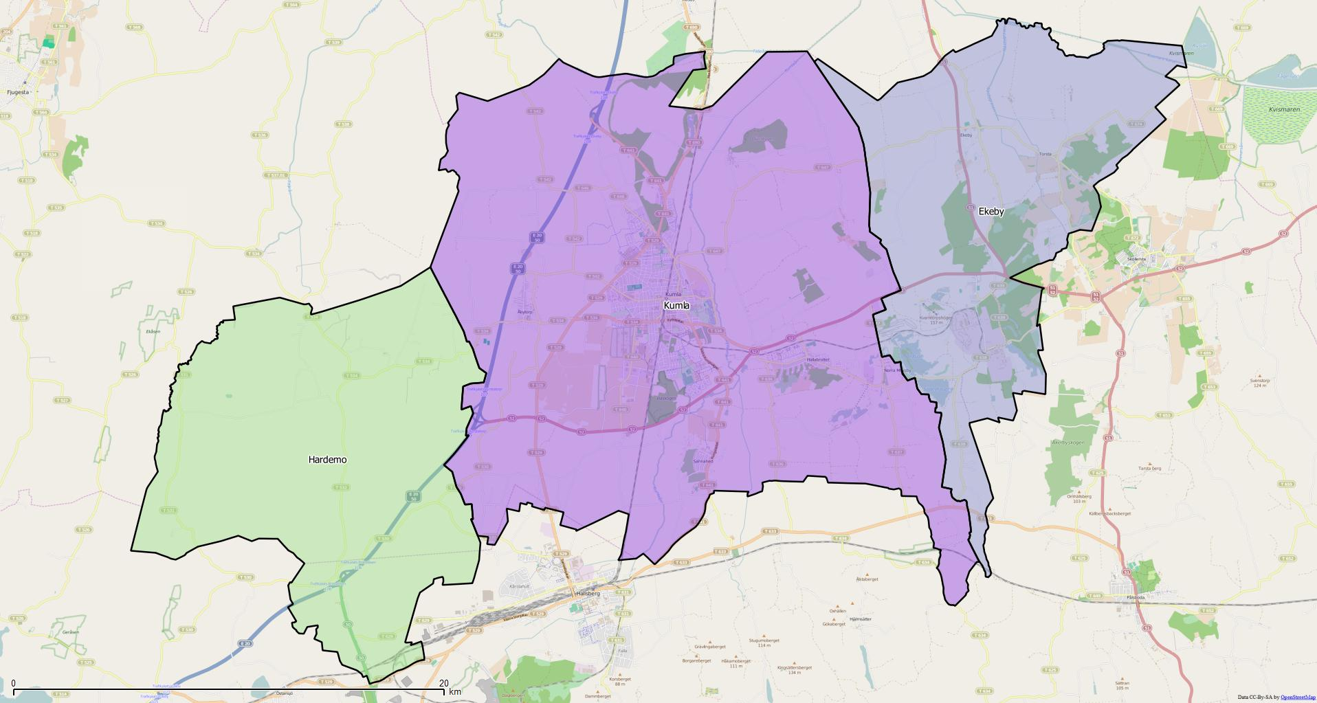 Distriktsindelningen i Kumla kommun World file: 31.92630124788545487 0 0 -31.92630124788545487 1654610.79543791175819933 8222228.7532303286716342